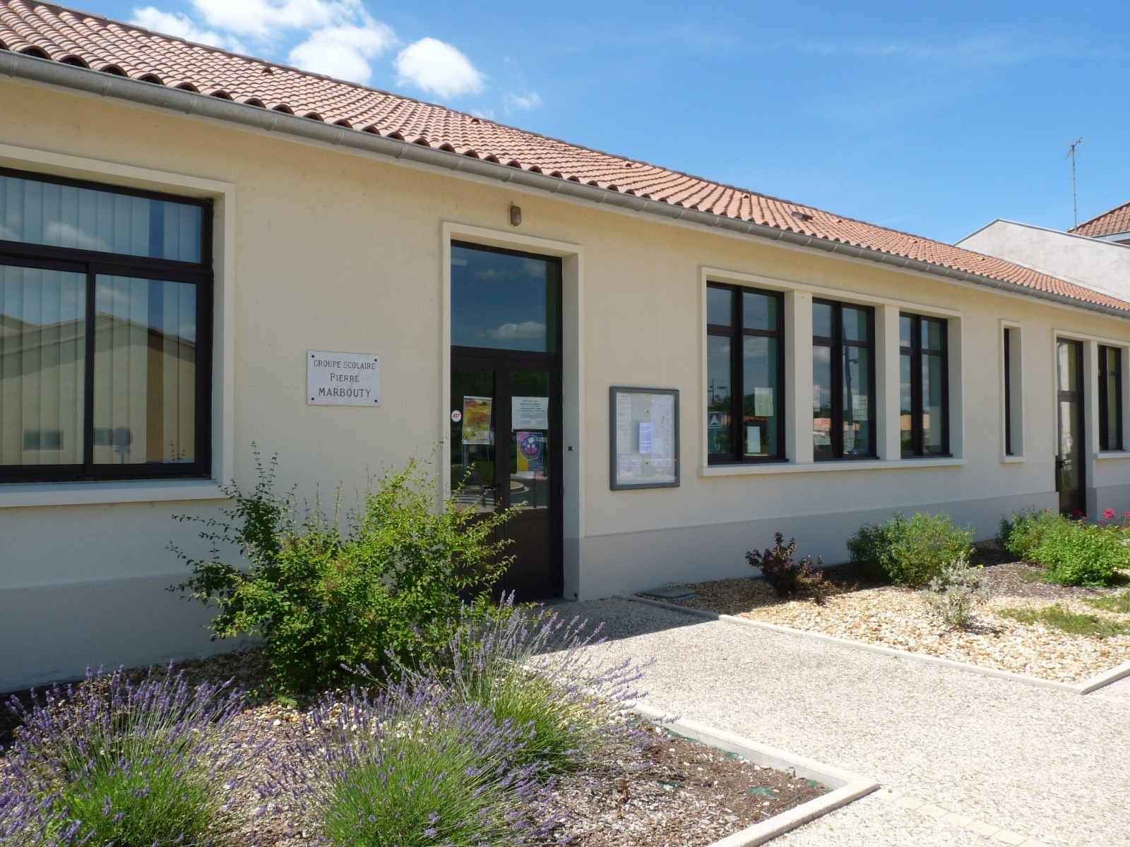 Ecole, place du général de Gaulle, Pineuilh, Gironde, France